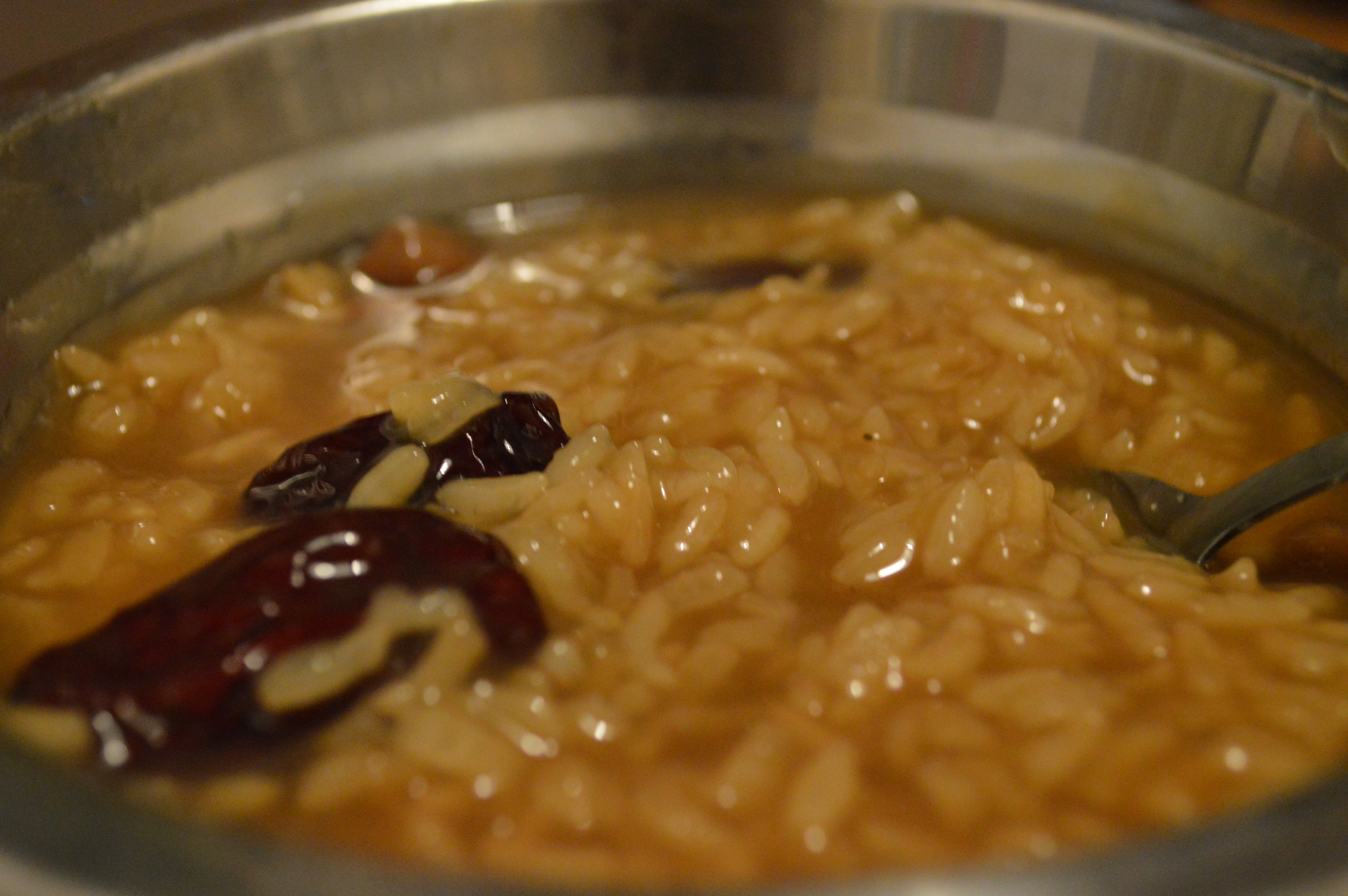 碗里的拗九粥